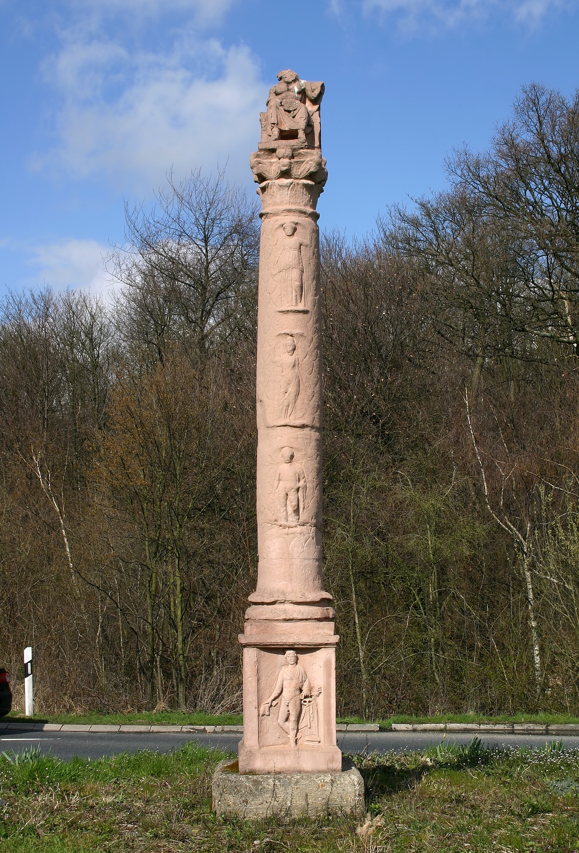 Jupitersäule aus dem Hambacher Forst. Standort: Im Kreisverkehr der L136/L264 nordöstlich von Stetternich, Jülich.